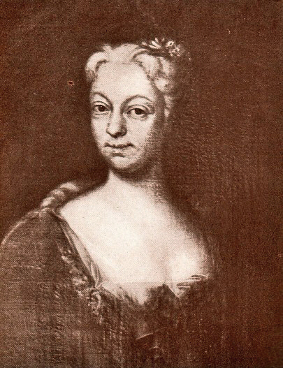 Marie Elisabeth von Ahlefeldt (1719-1769) Konventualin des Klosters Uetersen und Hofdame der Prinzessin Louise von Dänemark und Norwegen.